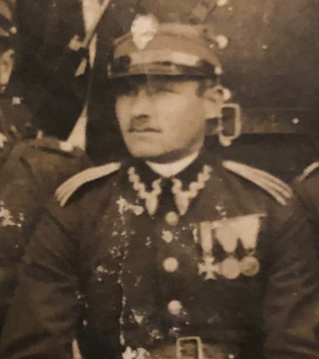 Adolf Matukin